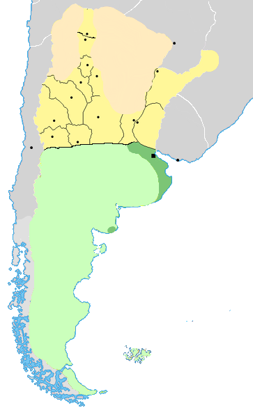 Mapa histórico de la provinca de Buenos Aires, Argentina, hacia 1861